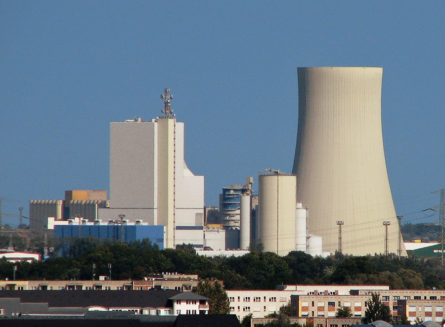 Beschreibung: Steinkohlekraftwerk (Sicht von St. Petri) / Rostock / Germany Fotograf: Darkone, 31. August 2005